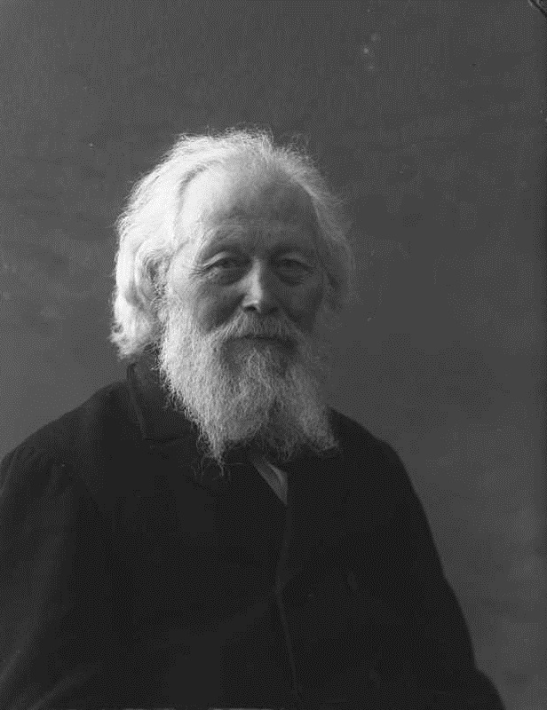 Ole Tobias Olsen fotografert av firma L. Szacinski i 1908.